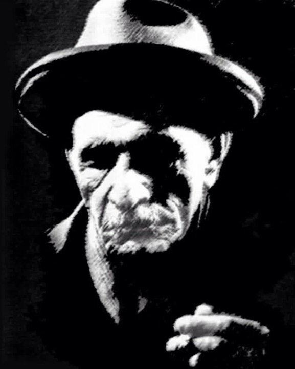 Gemälde von Asik Veysel